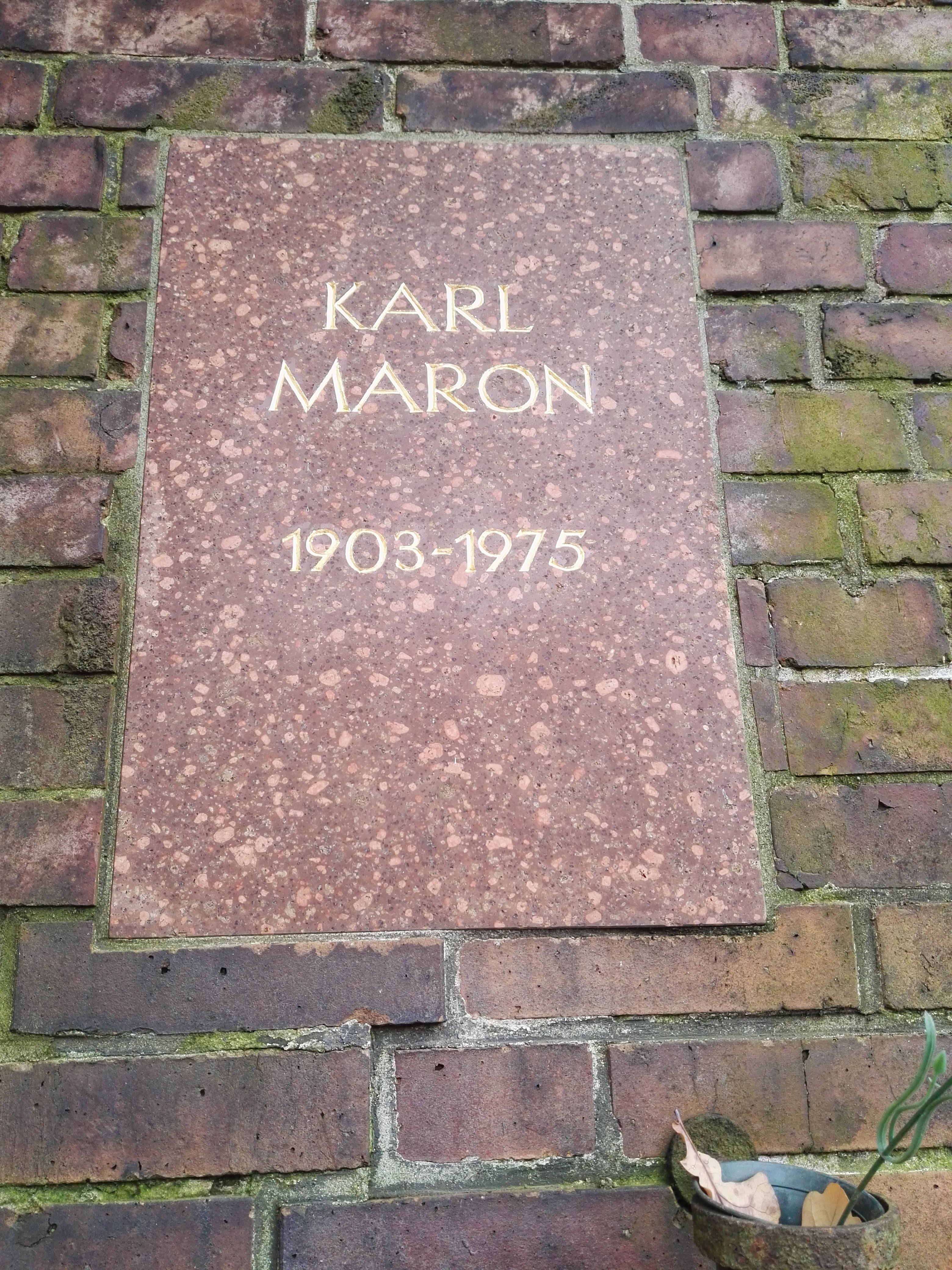 Grab von Karl Maron in der Gedenkstätte der Sozialisten auf dem Zentralfriedhof Friedrichsfelde in Berlin-Lichtenberg